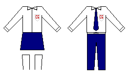 Uniforme del Colegio Goethe de Asunción, Paraguay.